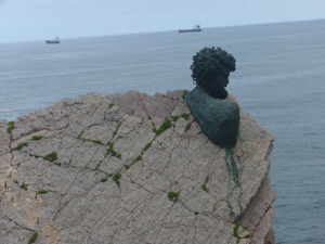 Busto de Philippe Cousteau en el Museo de Anclas de La Peñona, en Salinas